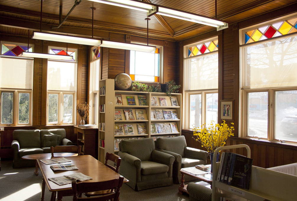 Coin lecture de la Bibliothèque commémorative Pettes